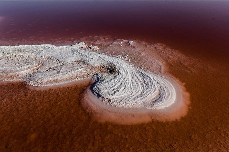 سرخی دریاچه ارومیه - تغییراتی مانند قرمز رنگ شدن دریاچه ارومیه در دریاچه های شور جهانی نظیر گریت سالت لیک آمریکا و دریاچه یوتا و بحرالمیت در اردن نیز دیده شده است.کارشناسان دلیل اصلی این تغییر رنگ را افزایش فعالیت آرتمیا و رشد جلبک در دریاچه ارومیه اعلام کرده اند. با کاهش دمای آب، شروع وزش بادهای منطقه ای و کاهش شدت و زمان نور خورشید و افزایش آب های ورودی ، این وضعیت به تدریج از بین خواهد رفت.